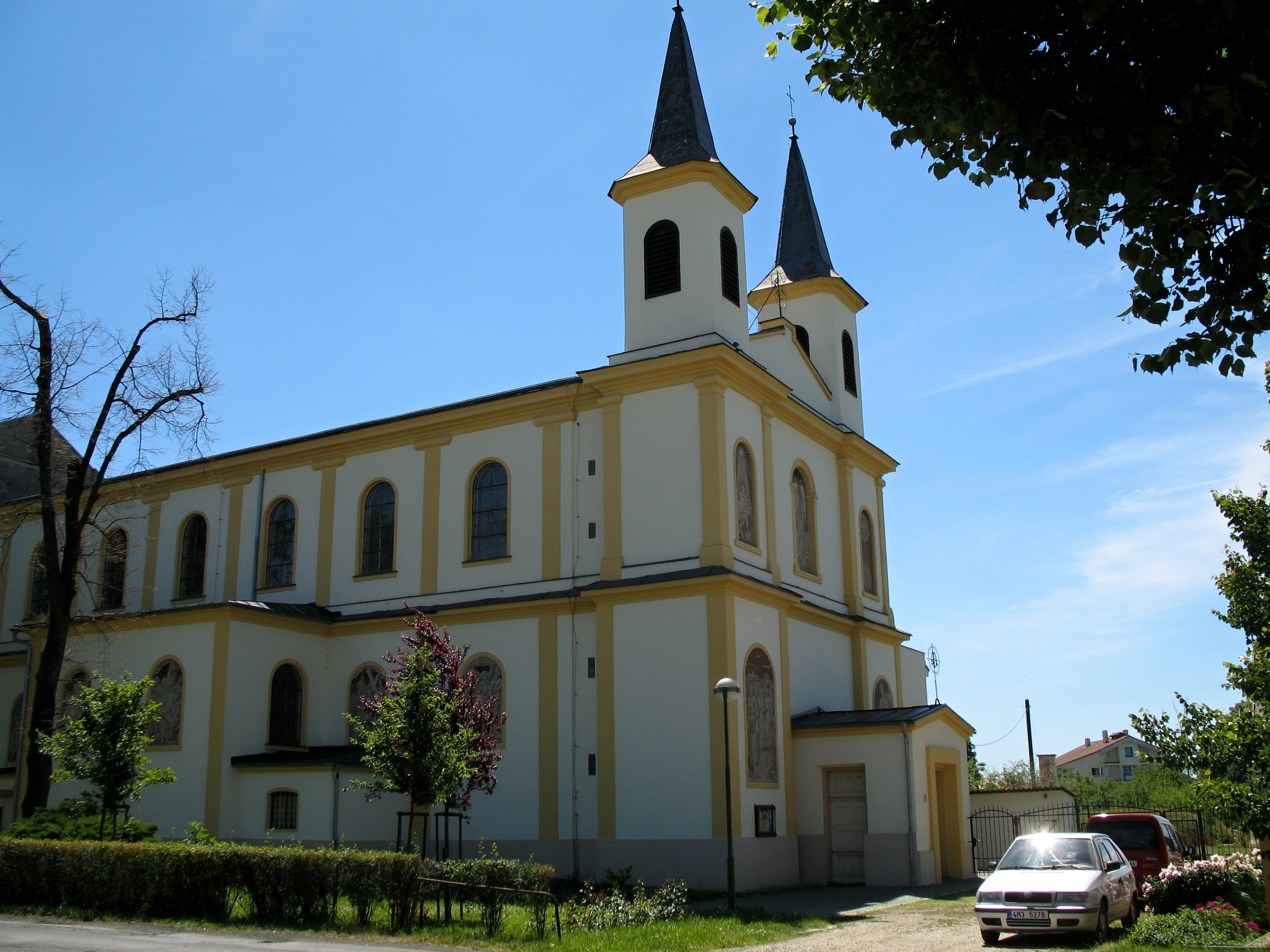 Kostel svatého Alfonse v Července, okres Olomouc